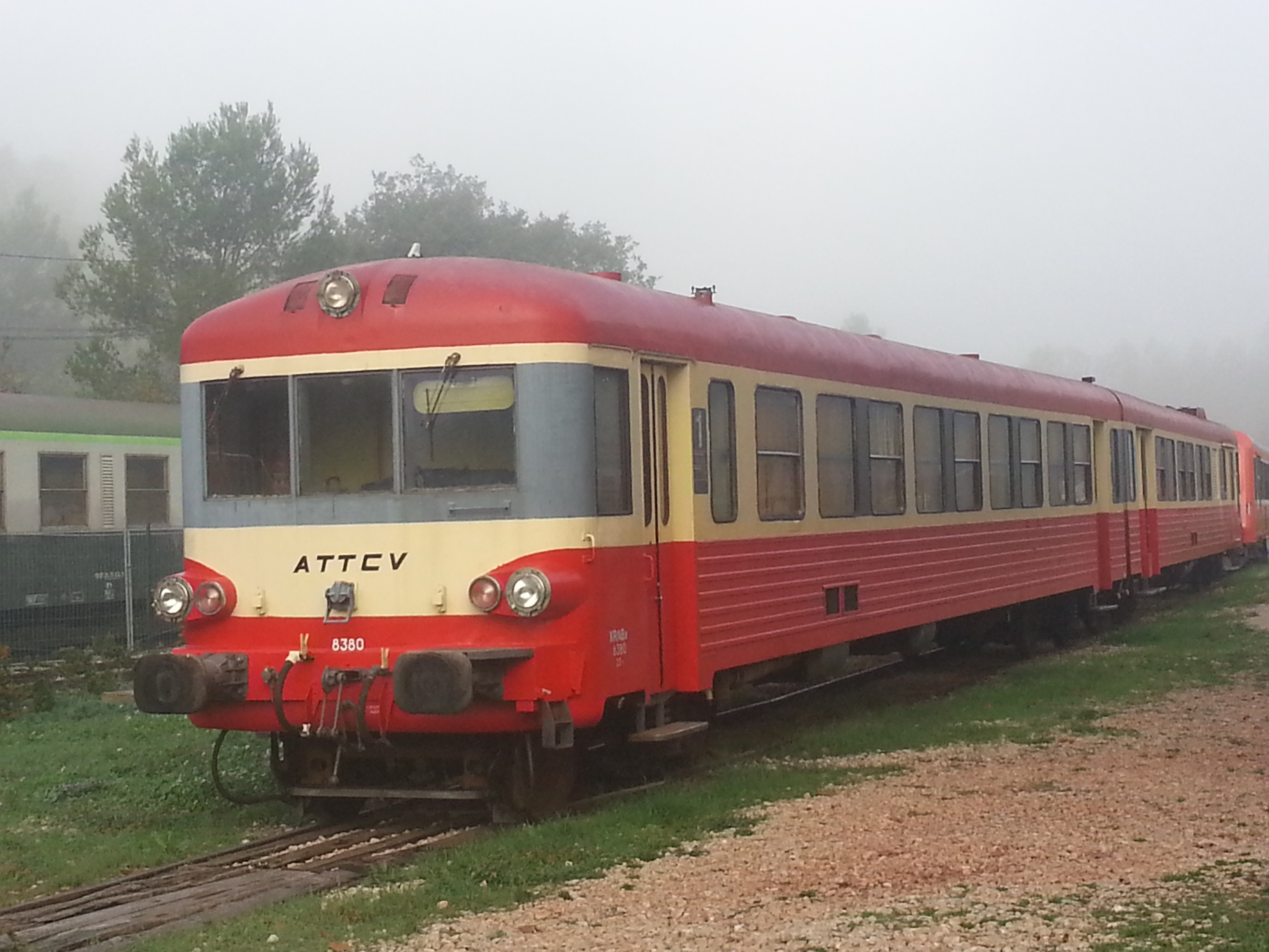 Autoral X4500 dit Caravelle prise à Carnoules (Var) en Octobre 2012